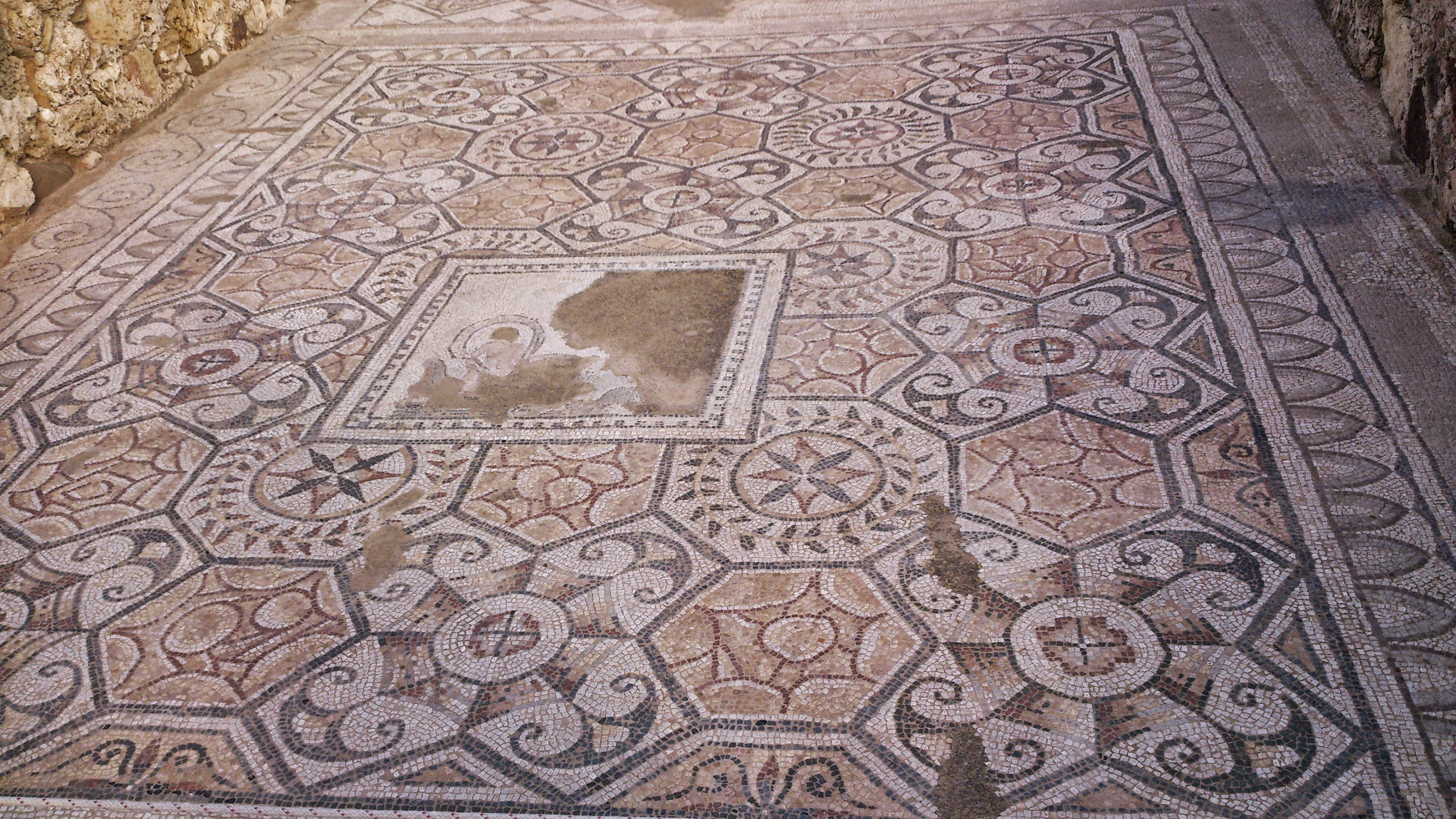 Area archeologica di Nora This is a photo of a monument which is part of cultural heritage of Italy.